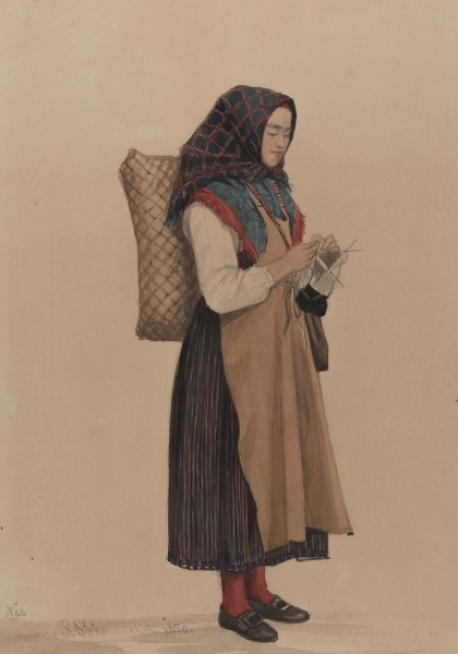 Kvinna i helfigur. "Vallkulla med stickning". Akvarell av P Södermark 1850. Depicted place: Nås socken (Q10605509)